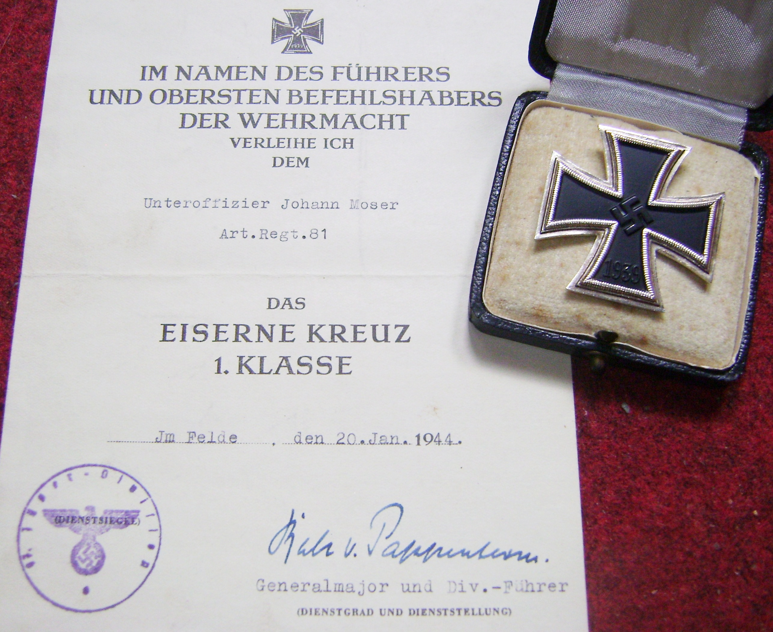 EK I mit Verleihungsurkunde